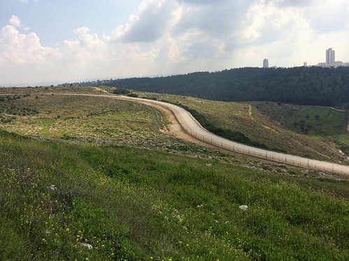 البلد:فلسطين الحافظة :رام الله الاسم: قرية المدية تعتبر قرية صغيرة نسبة لاعداد سكانها اللغة الرسمية :العربية تقع تحت اشراف: السلطة الفلسطينية الاحداثيات: 31° 56′ 8.91″ N, 35° 0′ 18.91″ E